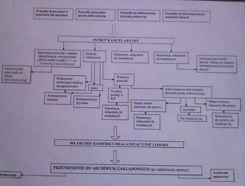 Diagram obrazujący obieg korespondencji w systemie EZD